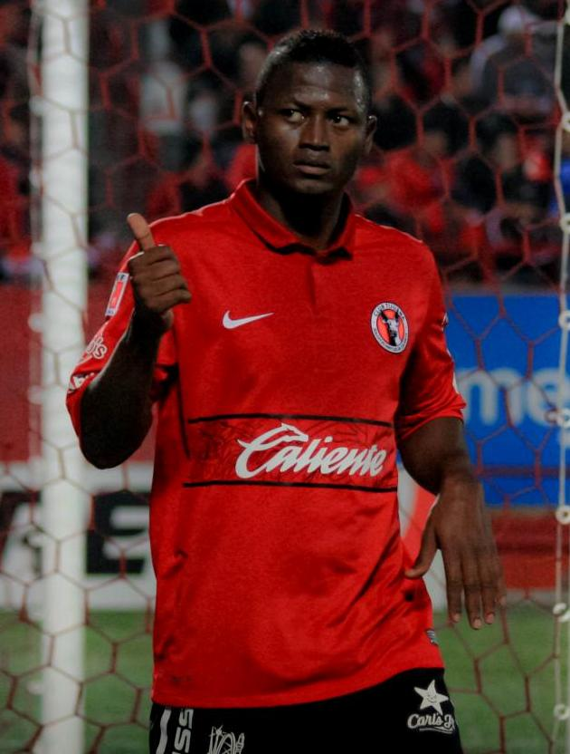 xolos vs rayados de monterrey en el estadio caliente de tijuana para la jornada 2 del clausura 2012 del futbol mexicano